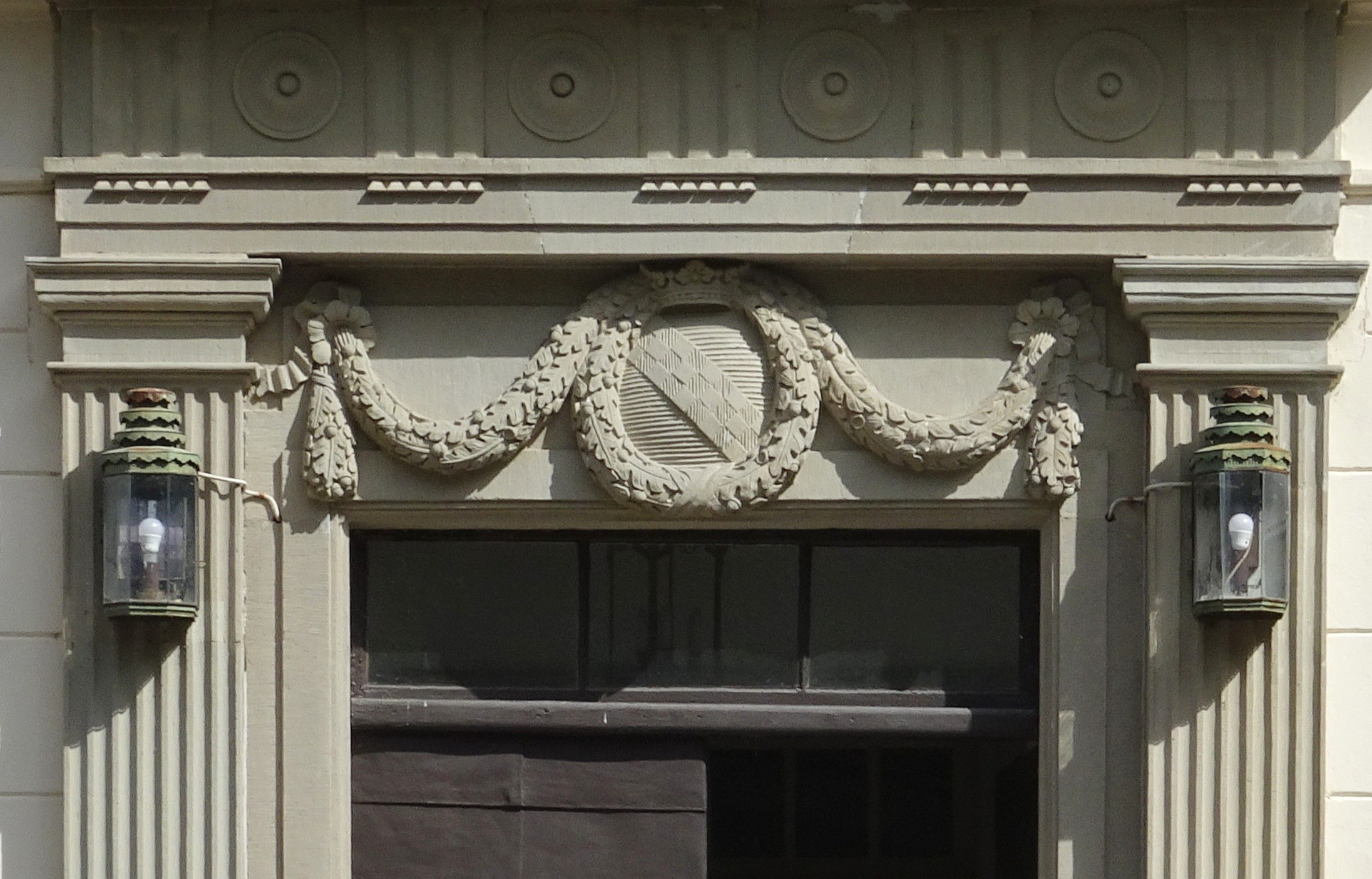 Lennartsnäs, Wachschlagers vapensköld över huvudportalen